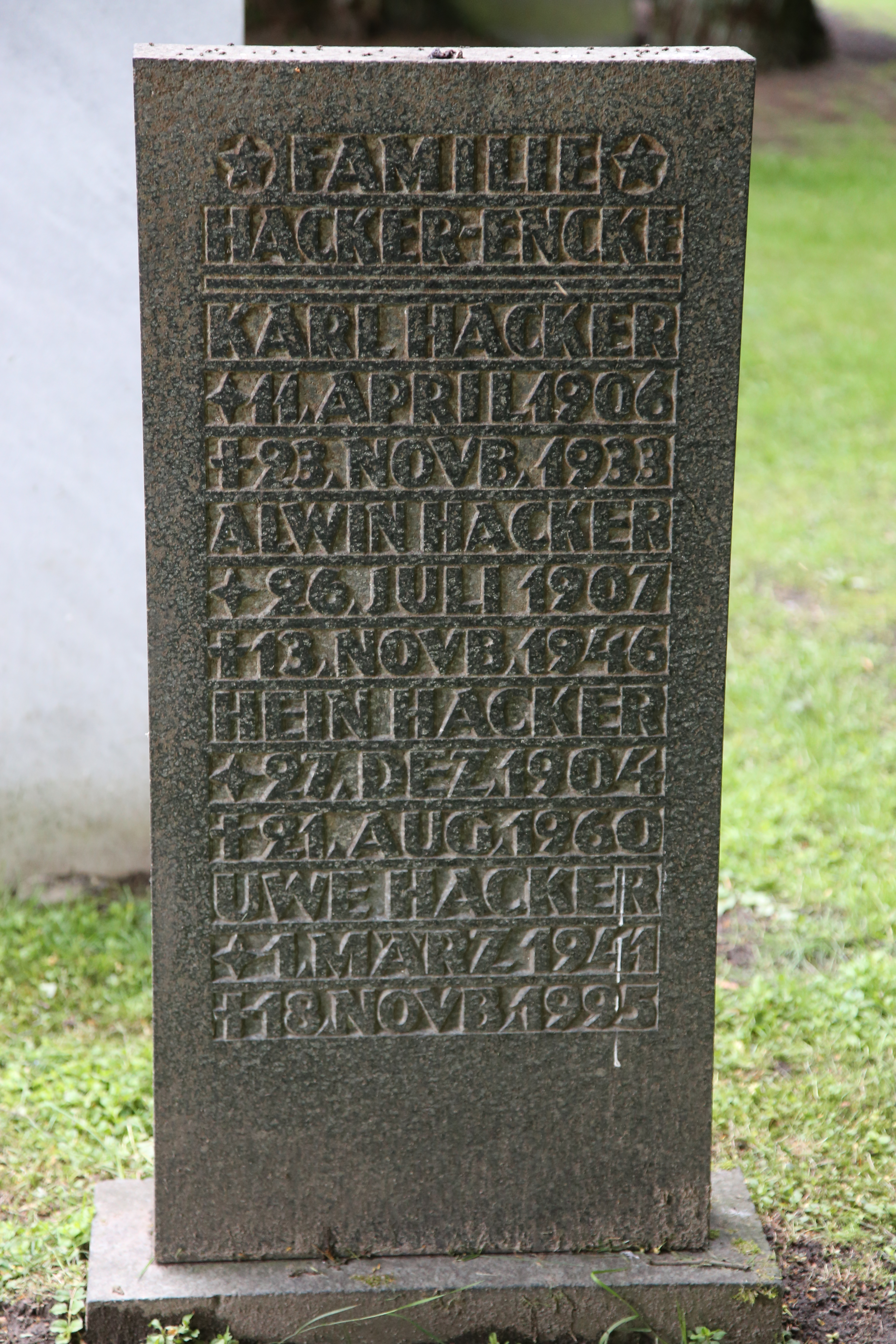 Uwe Hacker (* 1940 in Hamburg; † 1995 ebenda) war ein deutscher Schauspieler.